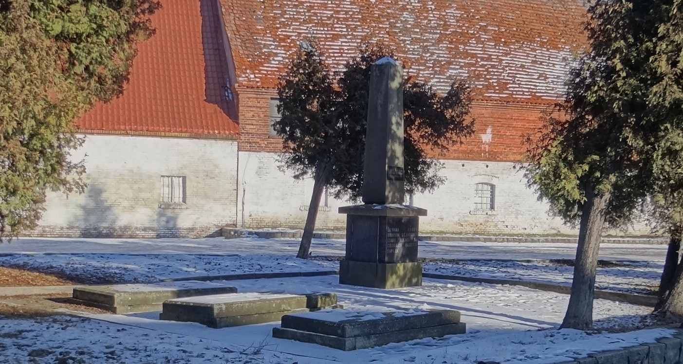 Pomnik żołnierzy radzieckich w byłym garnizonie radzieckim w Kluczewie